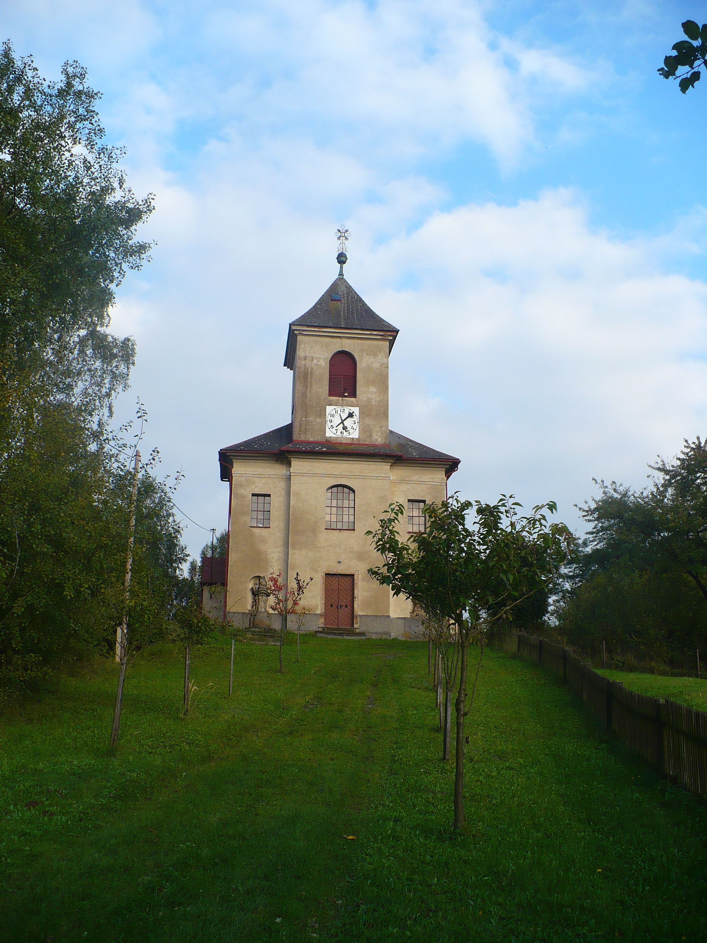 Kostel sv. Jana Křitele v Horní Dobrouči, pohled odspoda